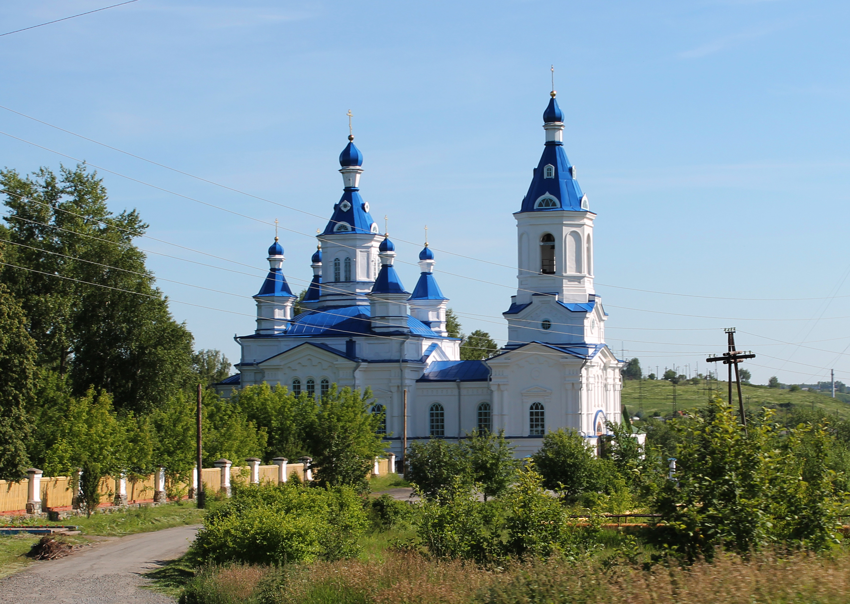 Екатерининская церковь, нач. XX в. Алапаевск